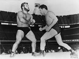 combate entre Karadagián y Gatica